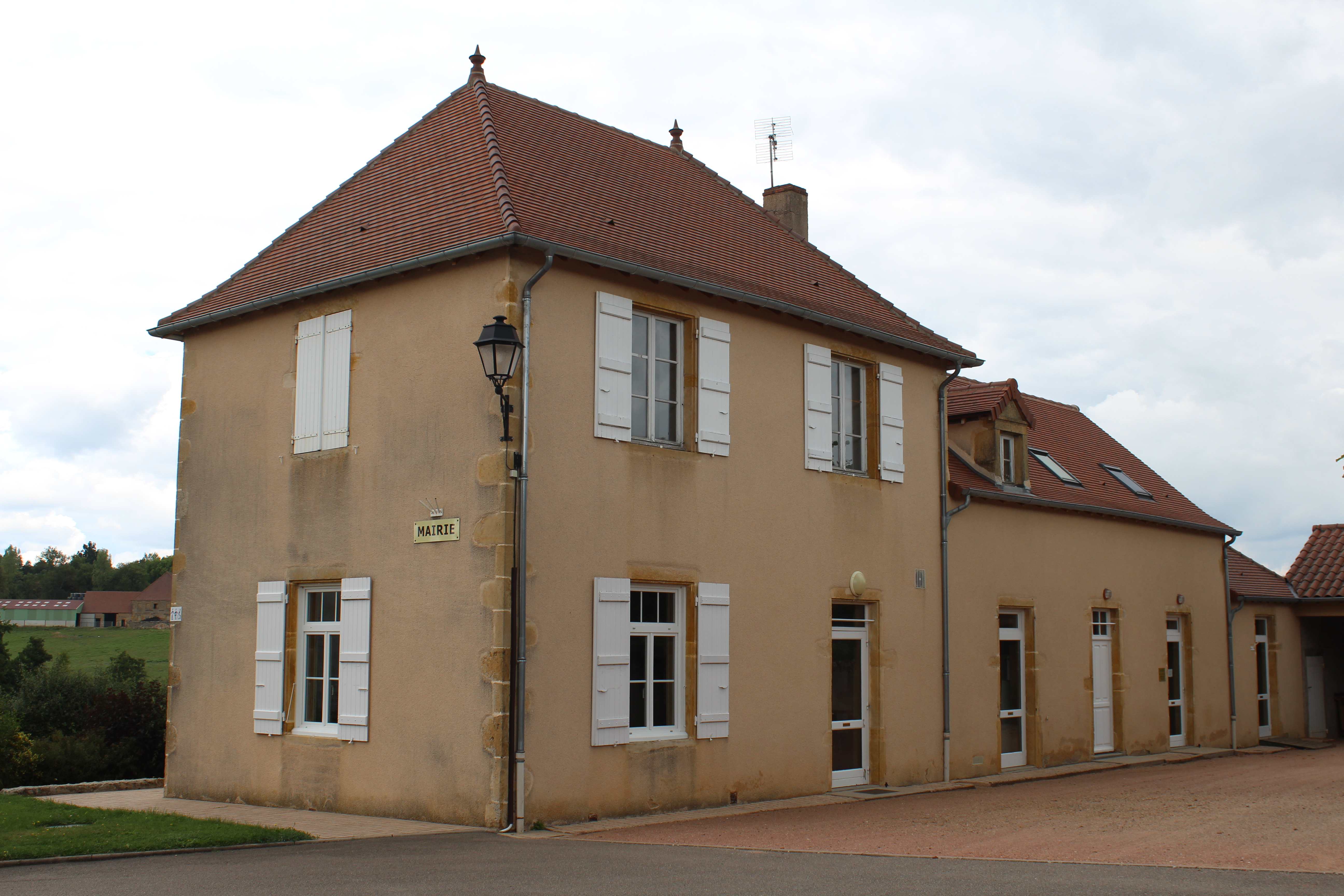 Mairie de Sarry, Saône-et-Loire.